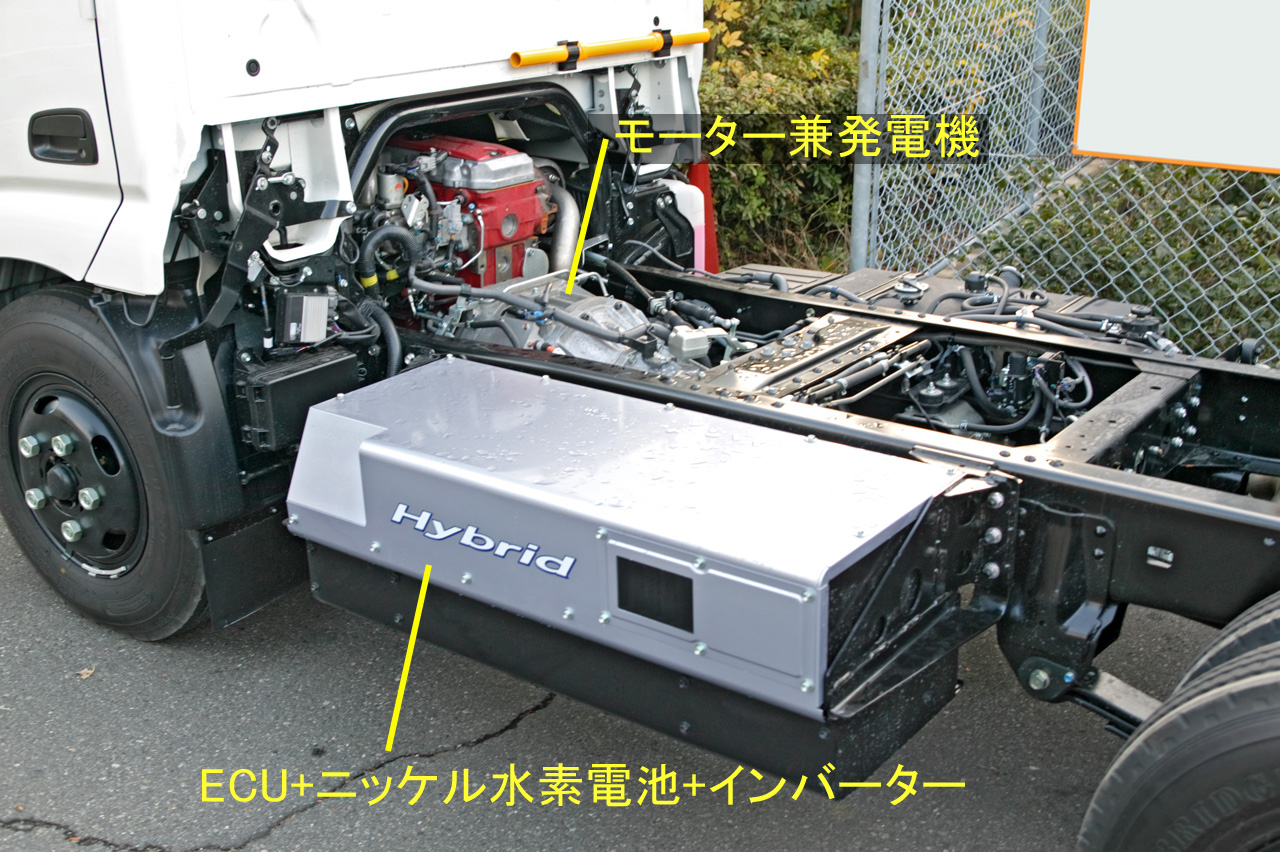 Hino Dutro Hybrid